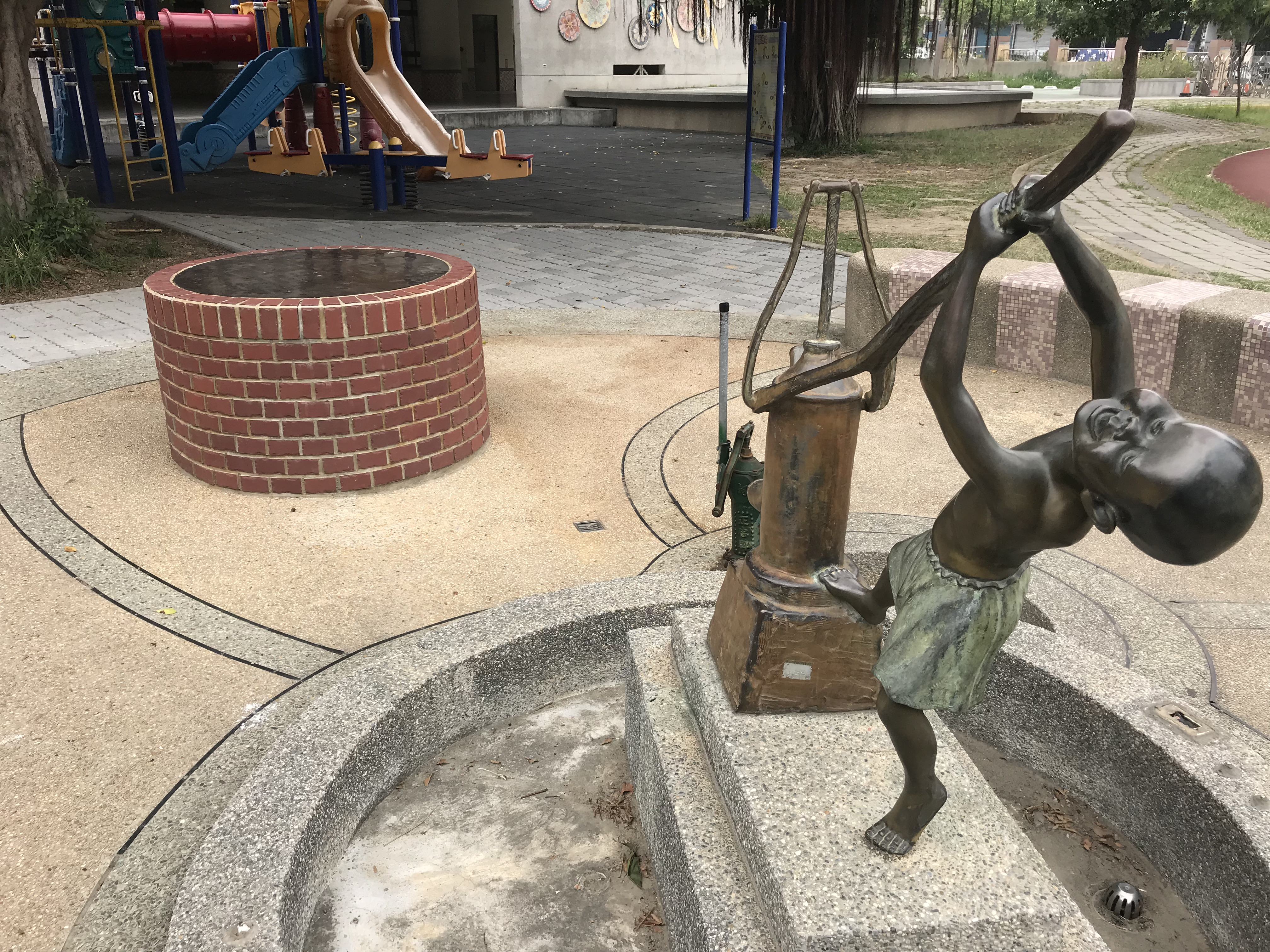 蓮蕉井與兒童打水銅像